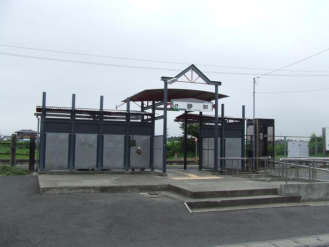 JR静駅駅舎